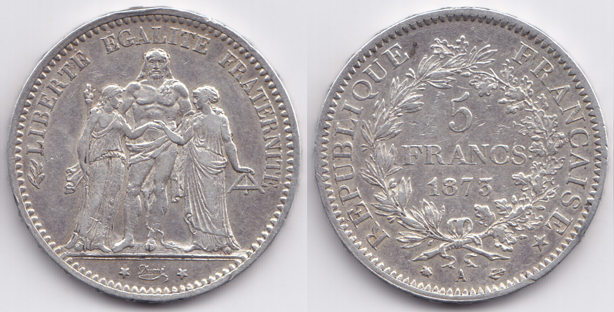 Монета 5 франков, 1873, тип "Геракл" (Дюпре) - Третья Французская республика. Серебро 900 пробы, диаметр - 37 мм, толщина - 2.8 мм, вес - 25 г. На гурте выпуклая надпись "***** DIEU * PROTEGE * LA * FRANCE".